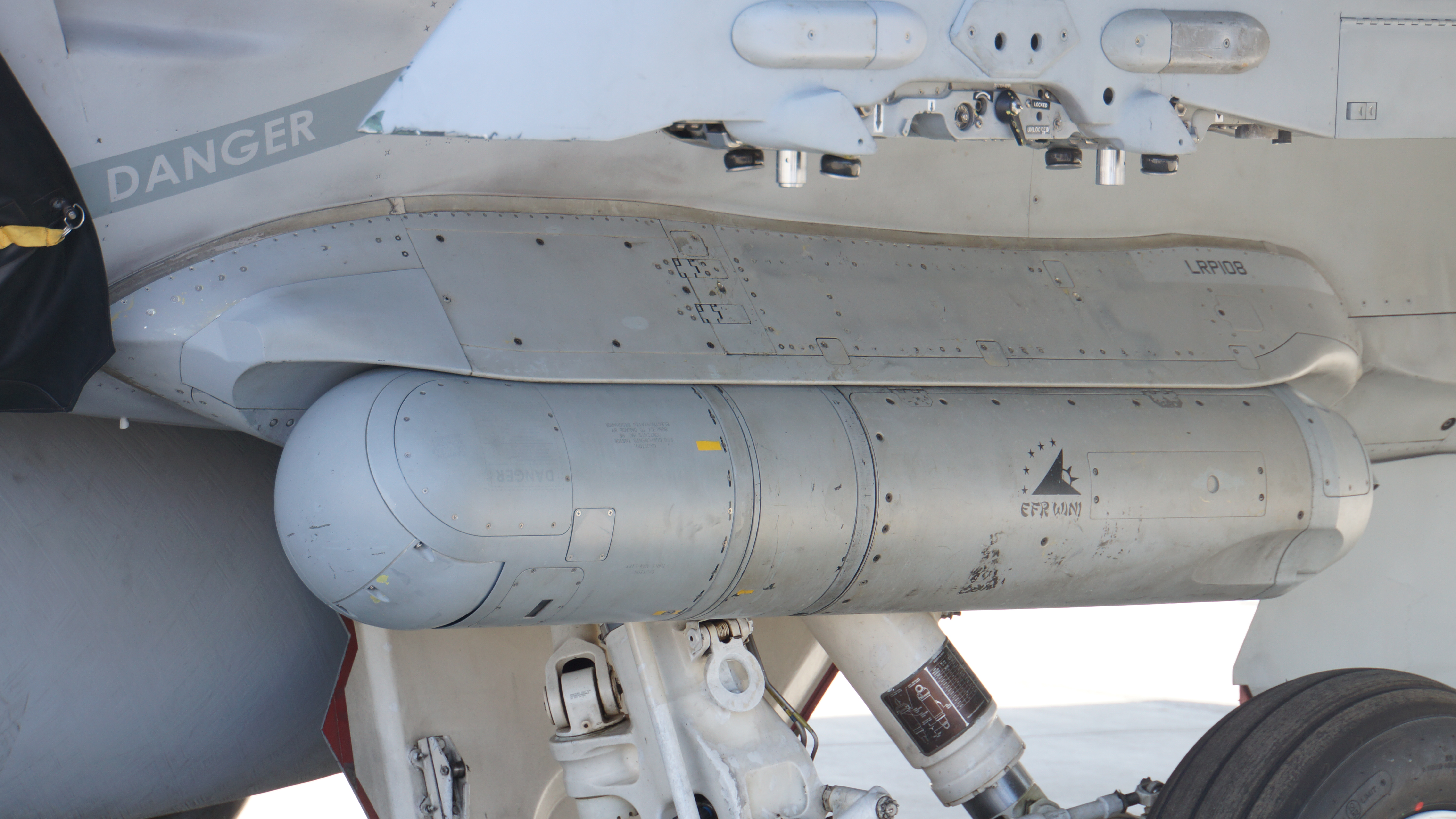 米海軍 地上展示されるF/A-18Eスーパーホーネット戦闘攻撃機 VFA-115戦闘攻撃飛行隊 CAG機（NF300/166859）に装着されたAN/ASQ-228 ATFLIRターゲティング・ポッド。2016年5月5日 米海兵隊岩国航空基地にて。